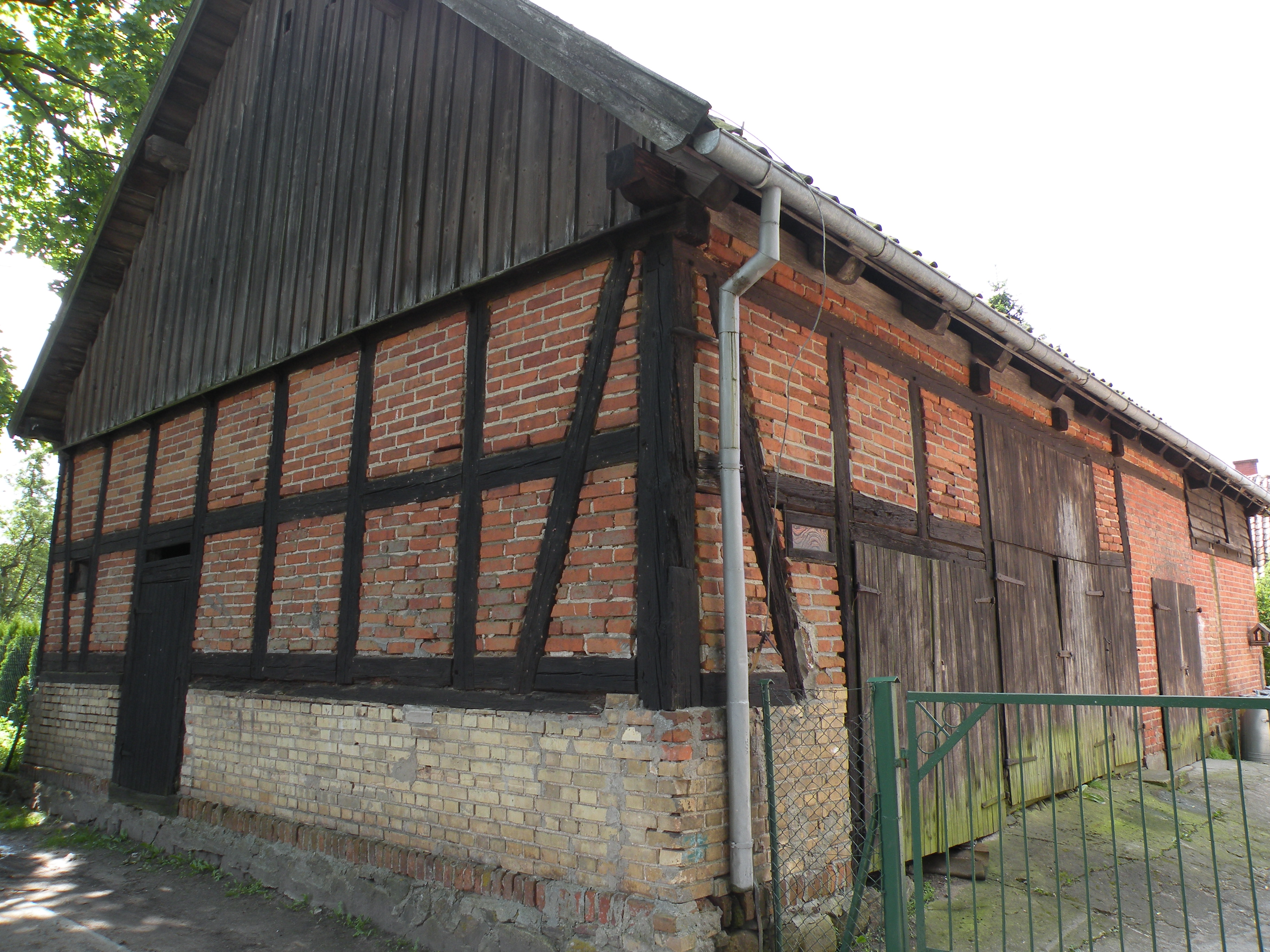 Budynek gospodarczy przy szkole, przed kociołem